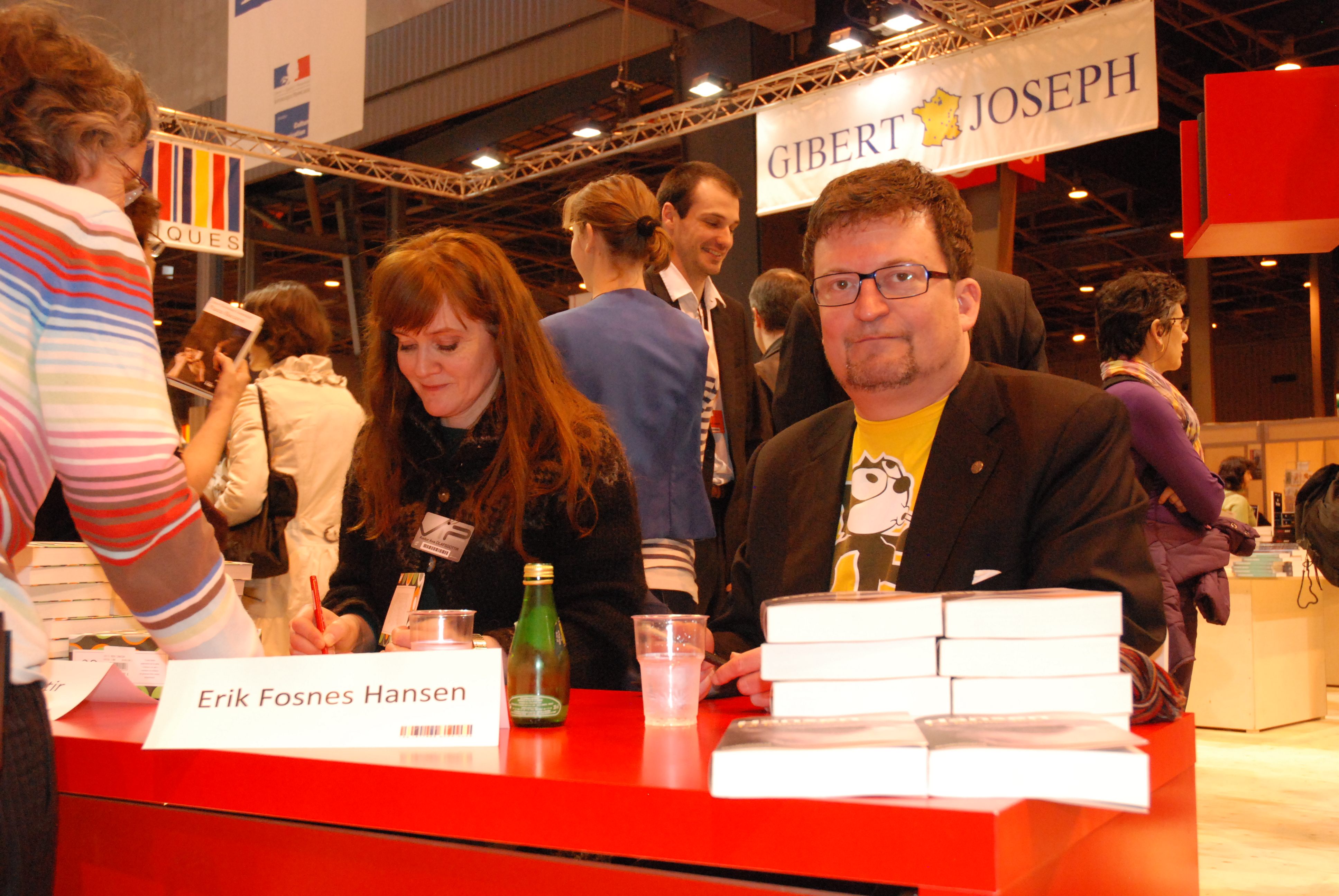 De to nordiske forfatterne signerer bøker på den franske bokmessen i Paris, Salon du Livre.